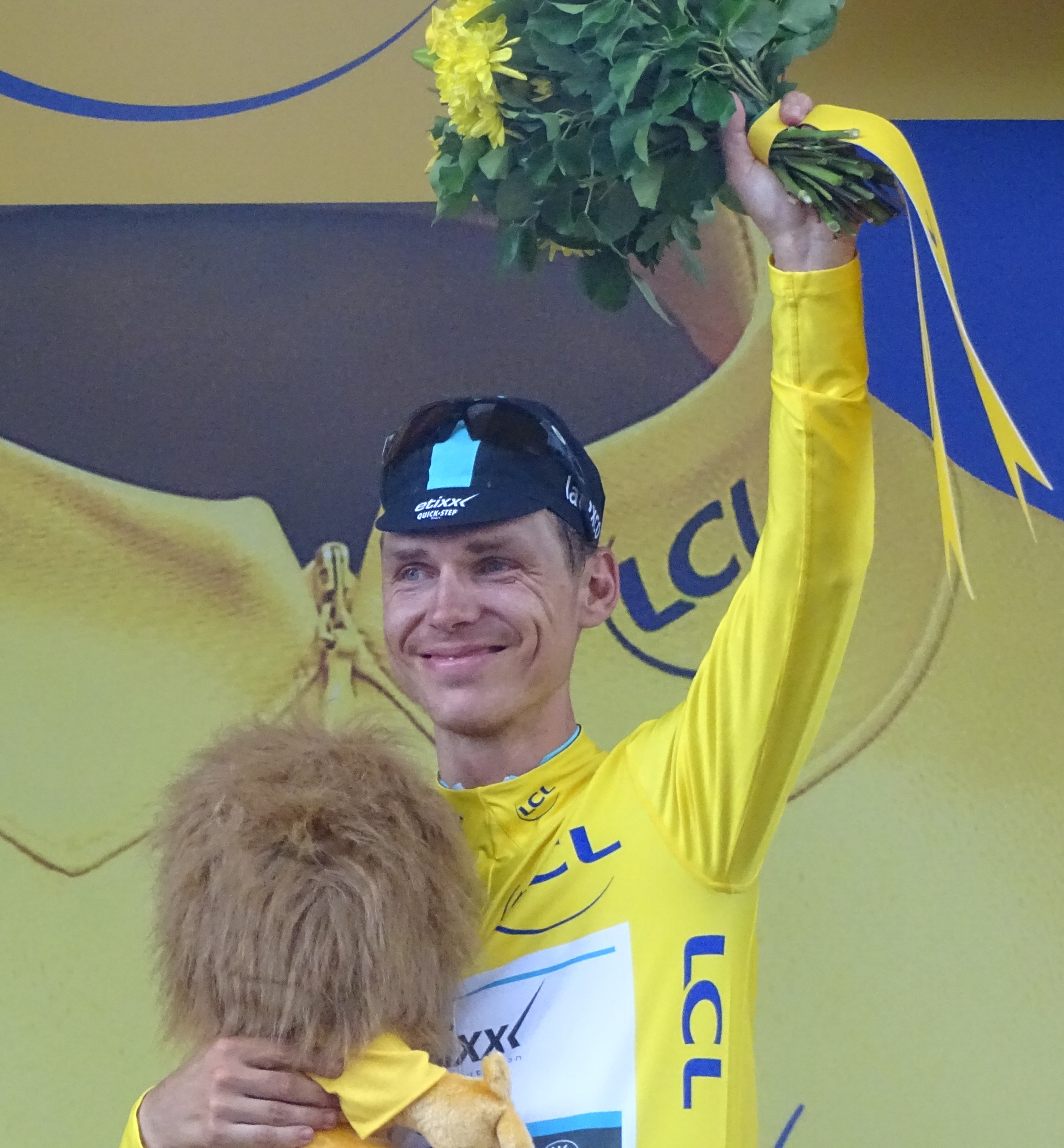 Reportage réalisé le mardi 7 juillet à l'occasion de l'arrivée de la quatrième étape du Tour de France 2015 à Cambrai, Nord-Pas-de-Calais, France.